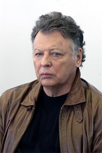 Russian writer Igor Volgin